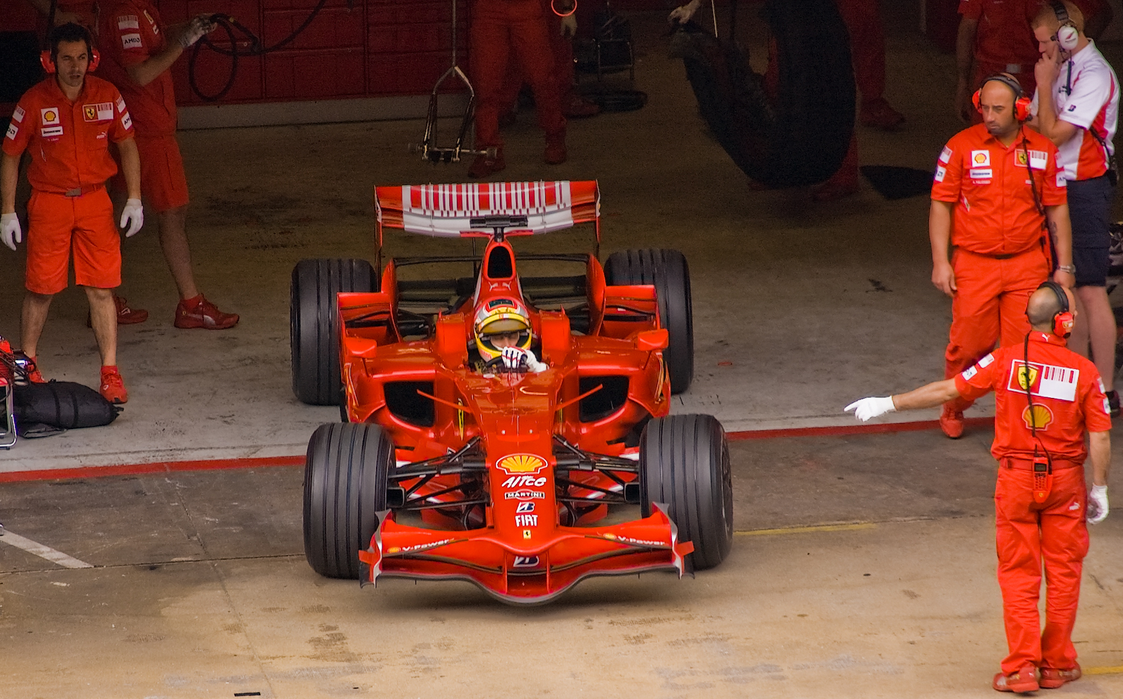 Nikon D40 + Sigma 18-200 DC OS HSM 1/160s - F/6.3 - 200mm - ISO200